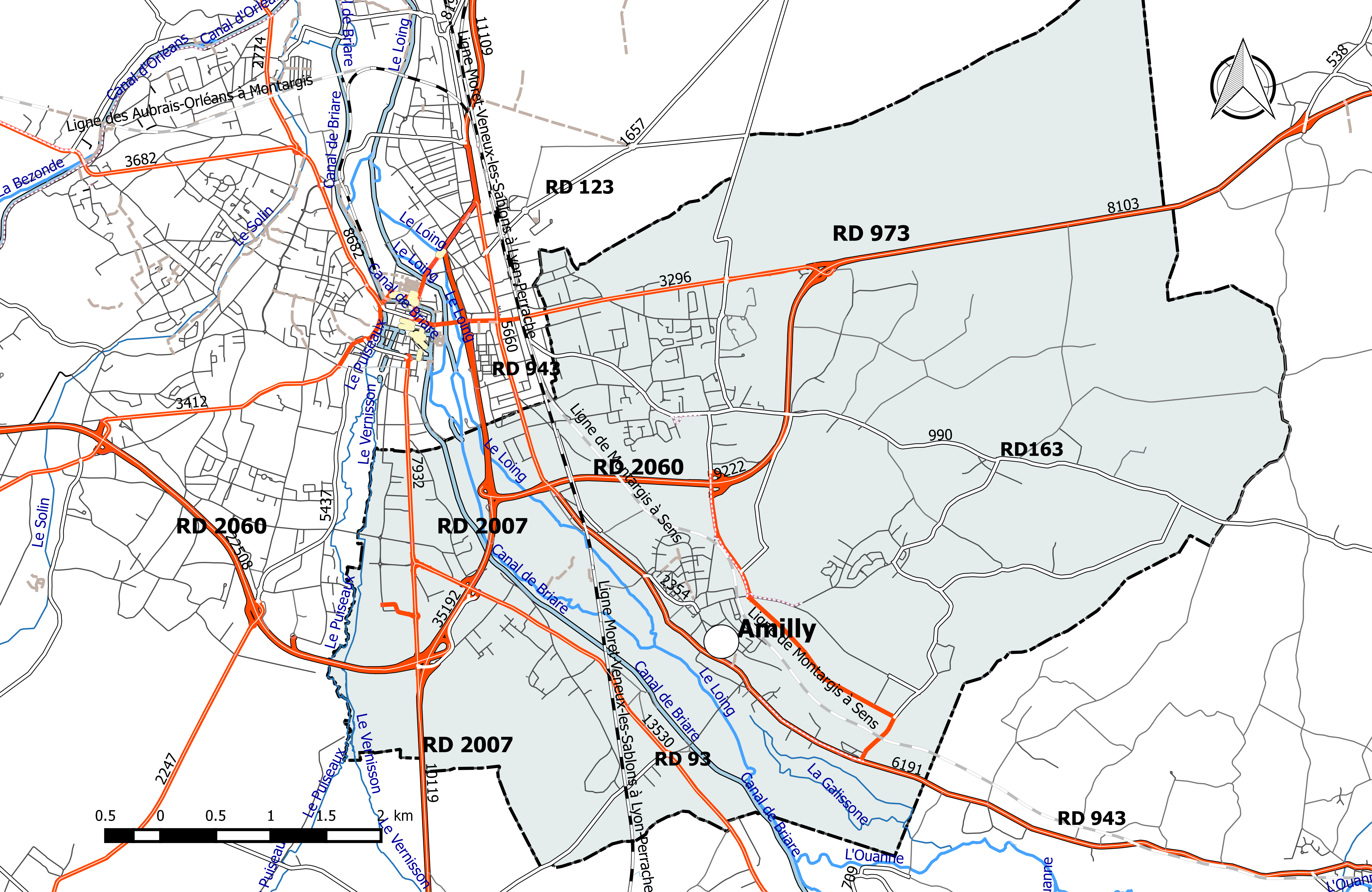 Carte du réseau routier de la commune de Amilly (Loiret).